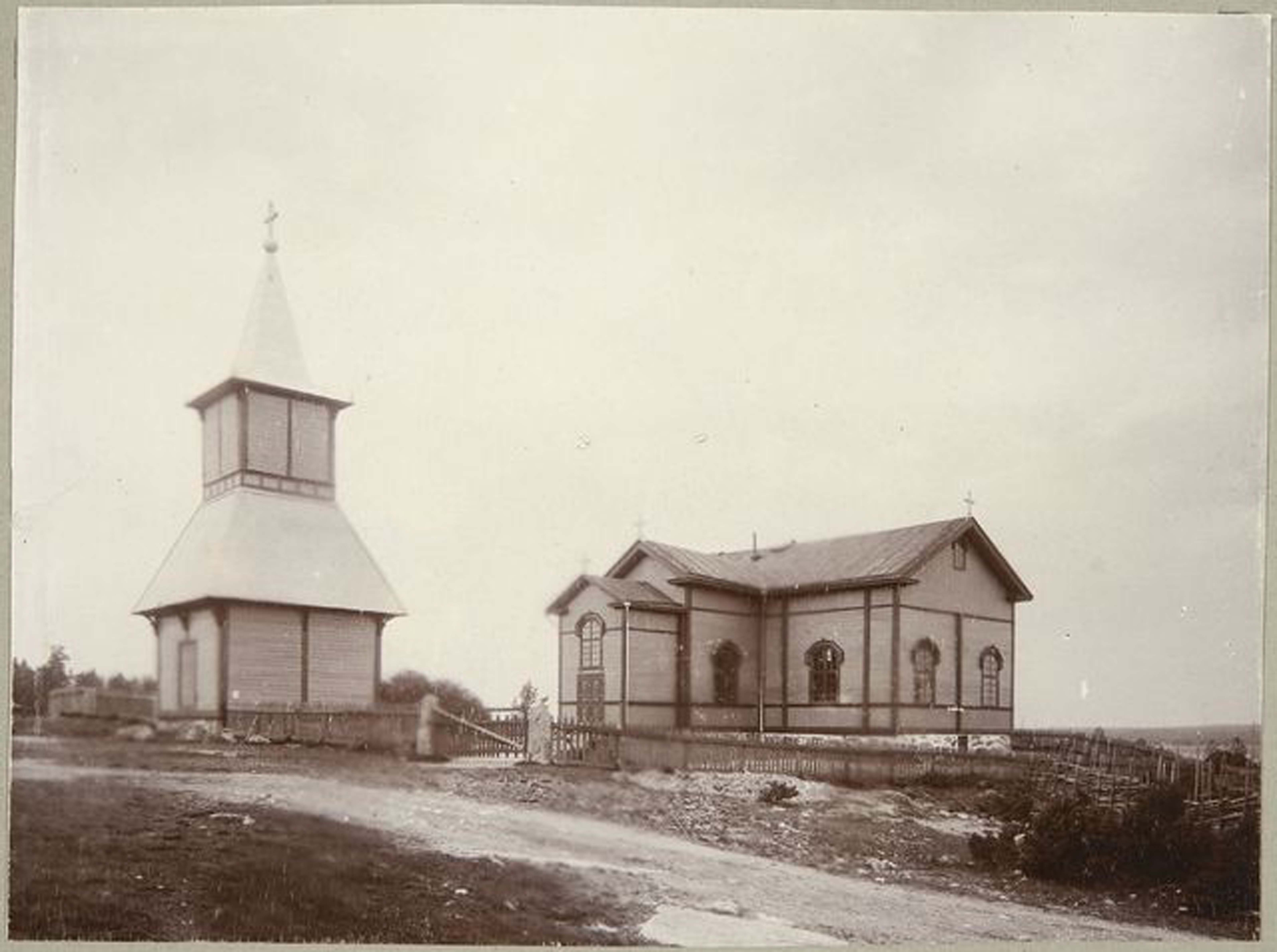 Kuusjoen kirkko ja kellotapuli